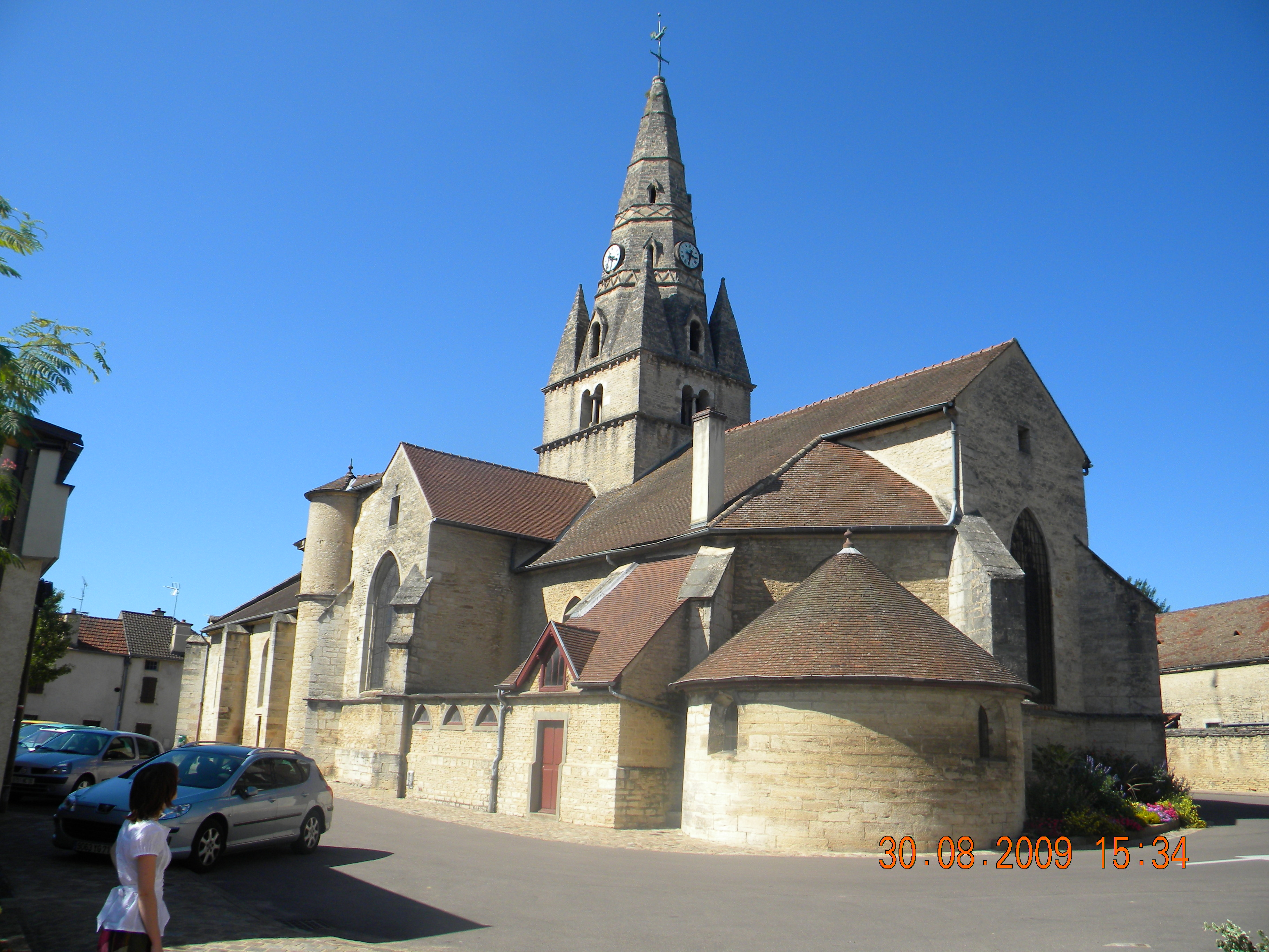 Eglise Saint-Cassien